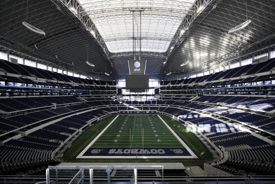 full view